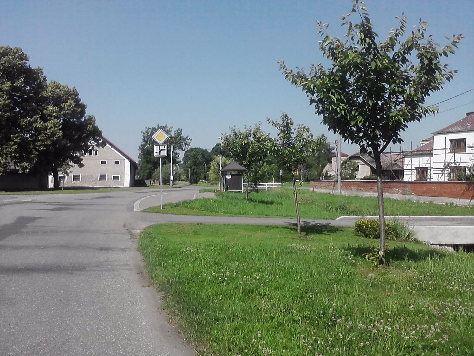 Centrum obce